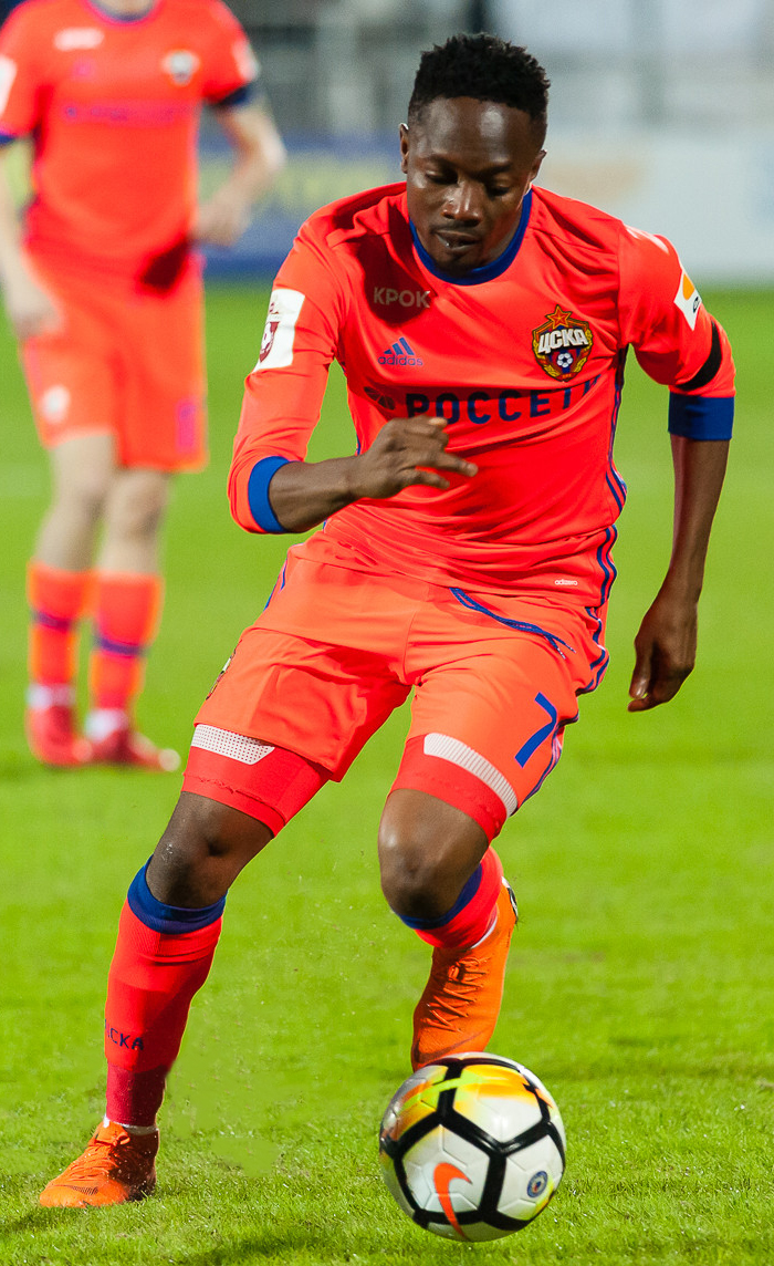 Эксперт Гудьонсен и разочарование Калачева - лучшие кадры матча «Ростов» - ЦСКА